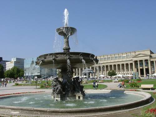 Stuttgart Schlossplatz - links mit neuem Kunstmuseum - rechts der Königsbau